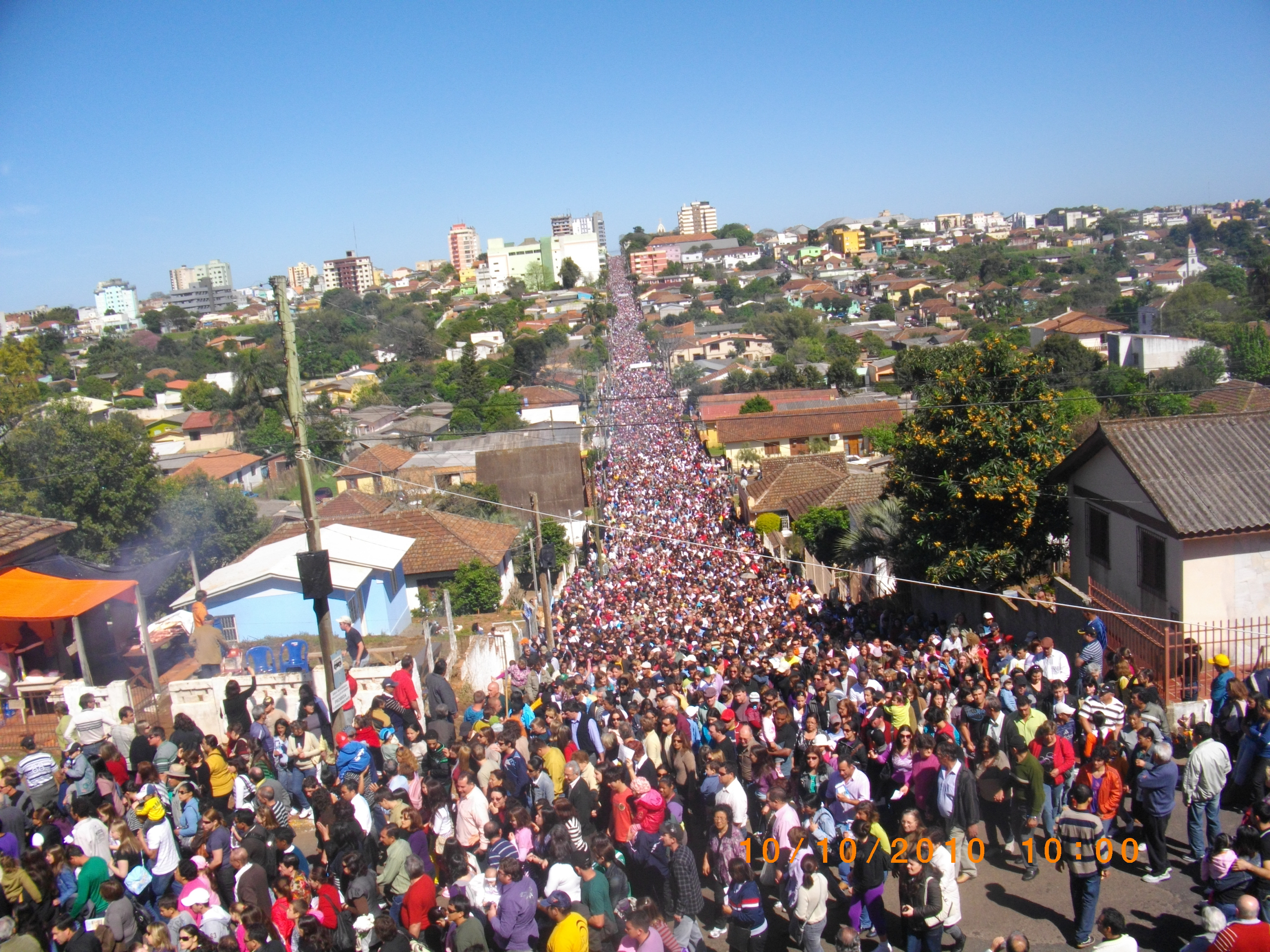 Procissão ao Monumento de Nossa Senhora de Fátima em Cruz Alta, RS, Brasil.